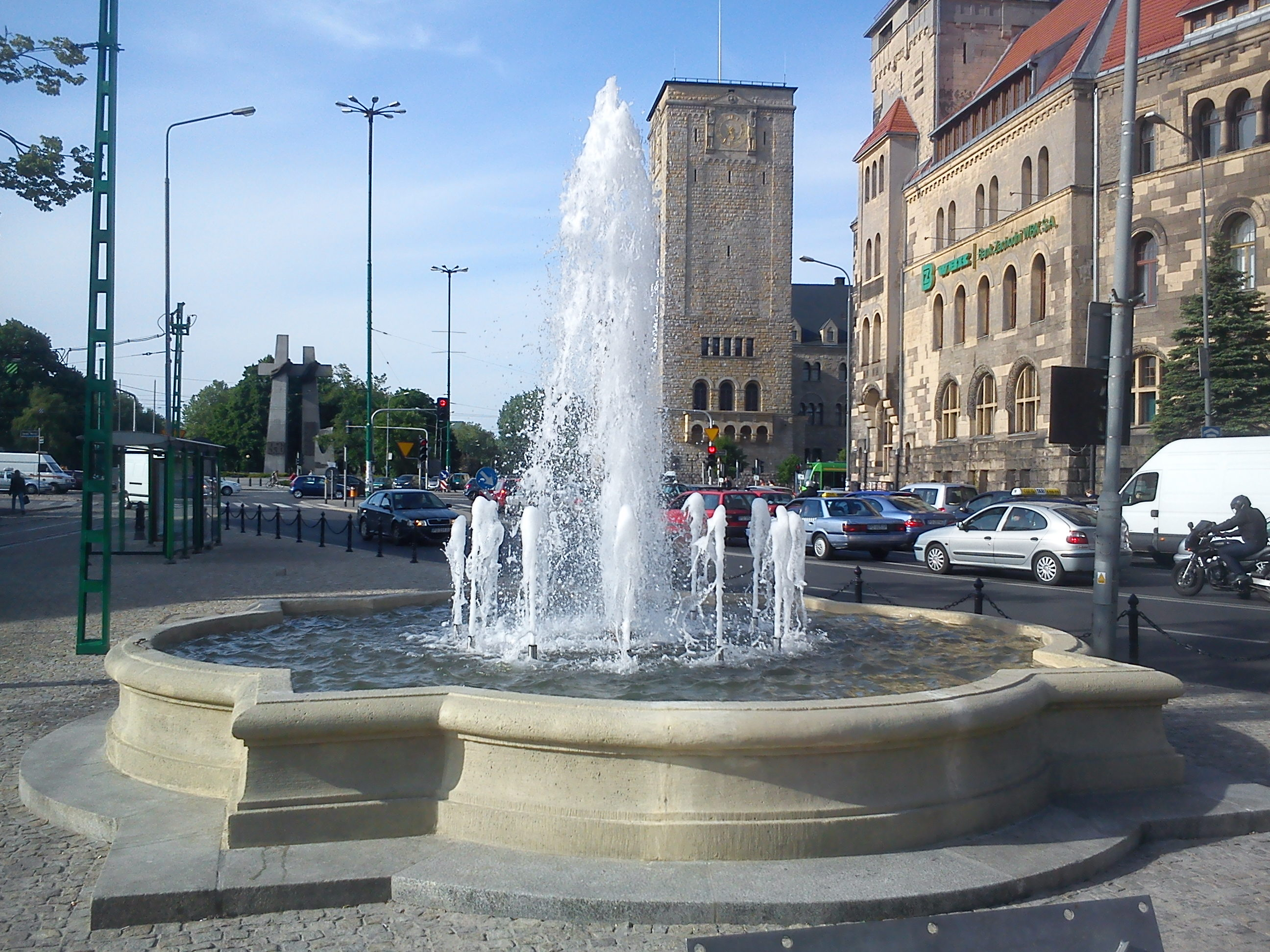 Fontanna (dawna fontanna Wojownika Brandenburskiego) w parku Maciejewskiego, Poznań.